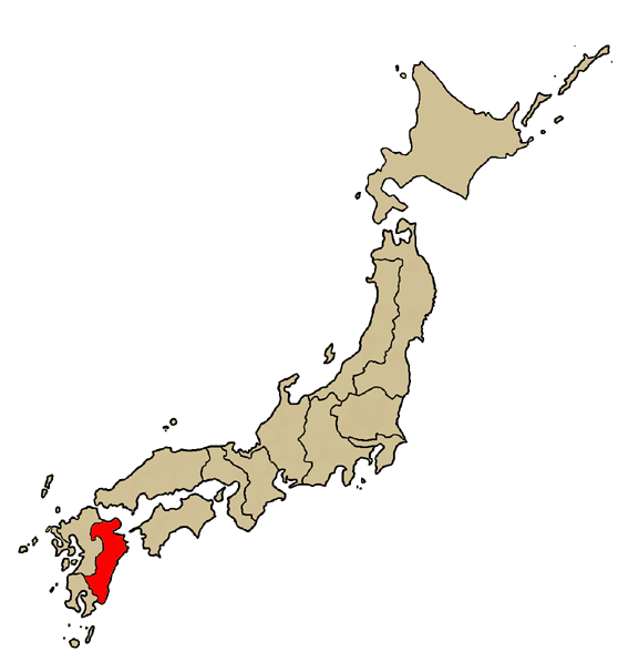 Mappa della diocesi cattolica di Oita, in Giappone. Lavoro personale.